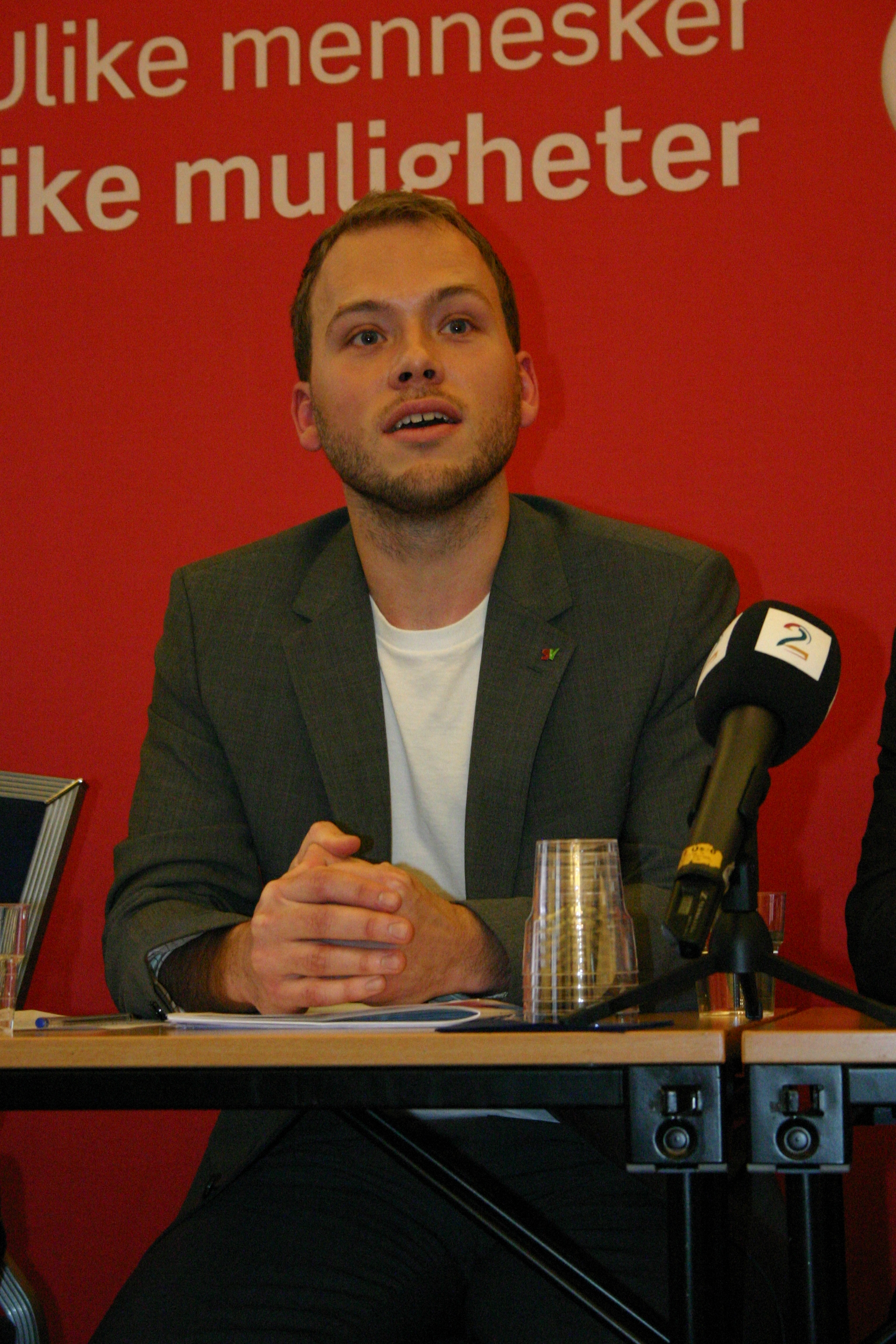 Audun Lysbakken, nestleder i SV.